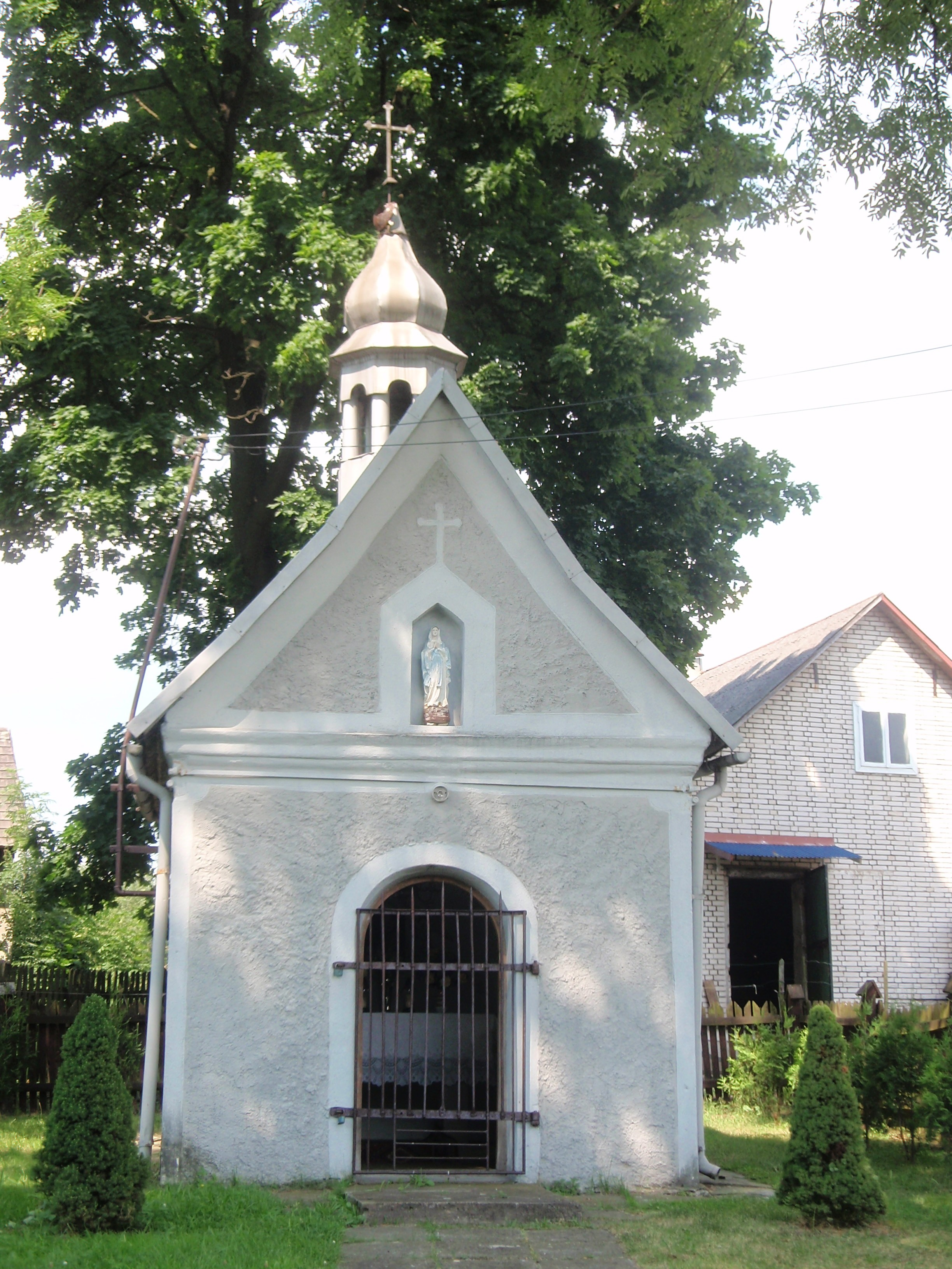 Kapliczka w Dąbrowie Górniczej-Błędowie (woj. śląskie)